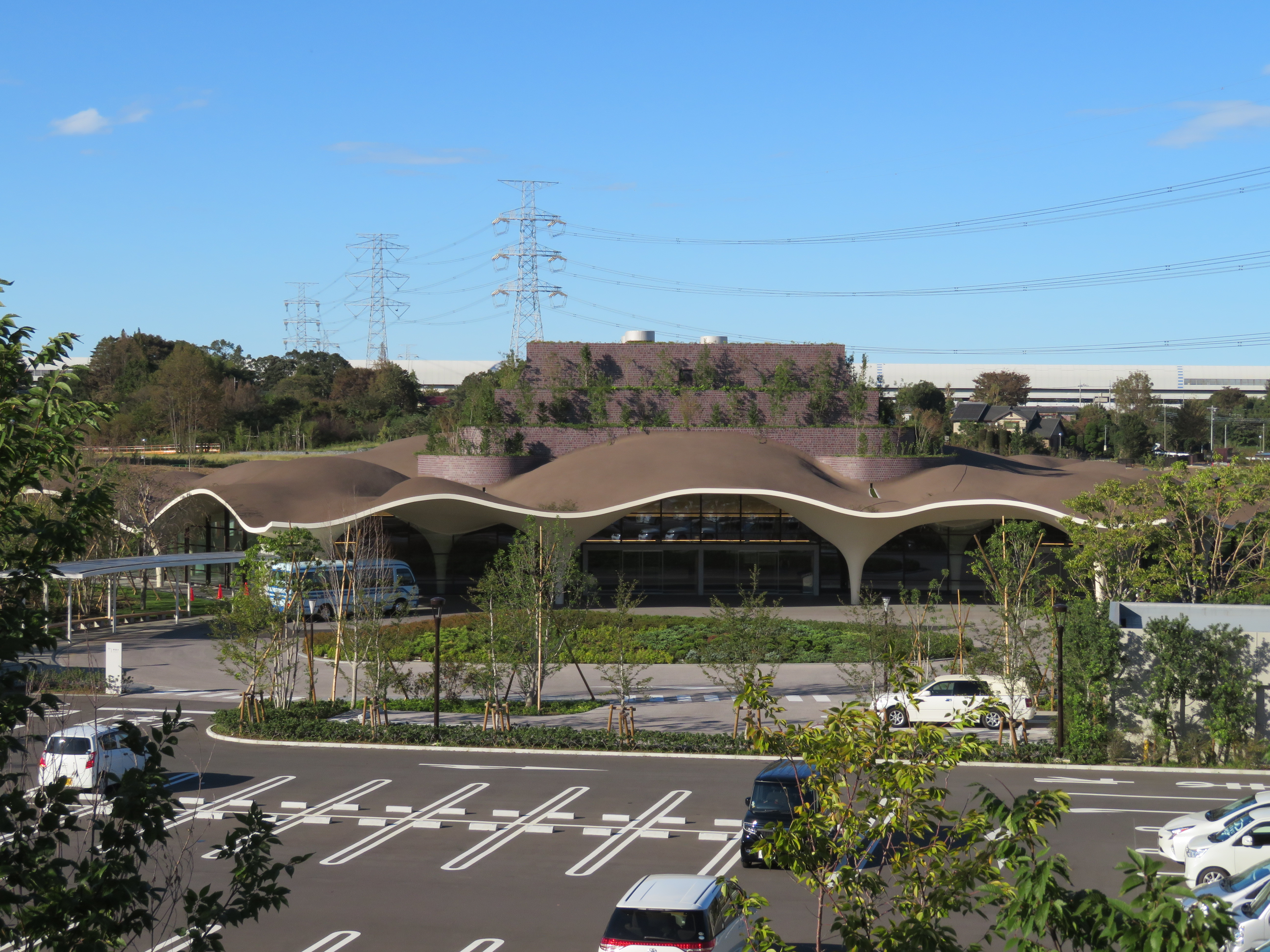 埼玉県川口市に所在する川口市めぐりの森（火葬場） Canon PowerShot SX720 HS